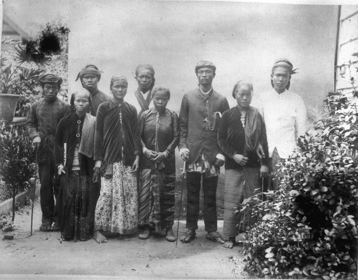 Foto. Suriname, immigranten afkomstig uit Nederlands-Indië, de vrouw rechts draagt een peniti tak broche